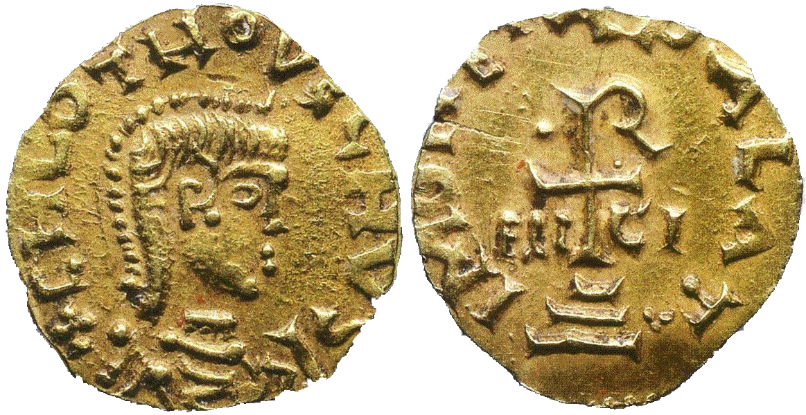 Tiers de sou d'or de Clovis II (639-657). Bibliothèque nationale. Avers: Effigie de Clovis II à droite, la nuque entourée de perles. Revers : Croix chrismée, sur 3 degrés, accostée des lettres ELI-CI.